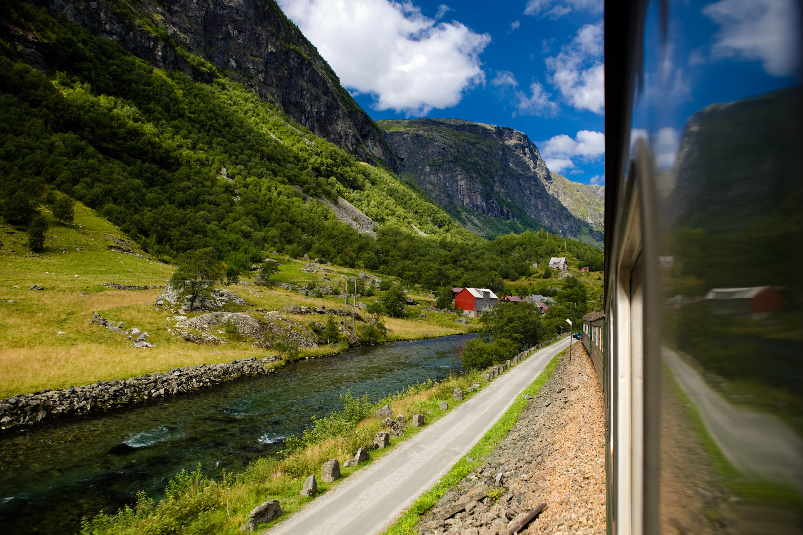 Flåmsbana